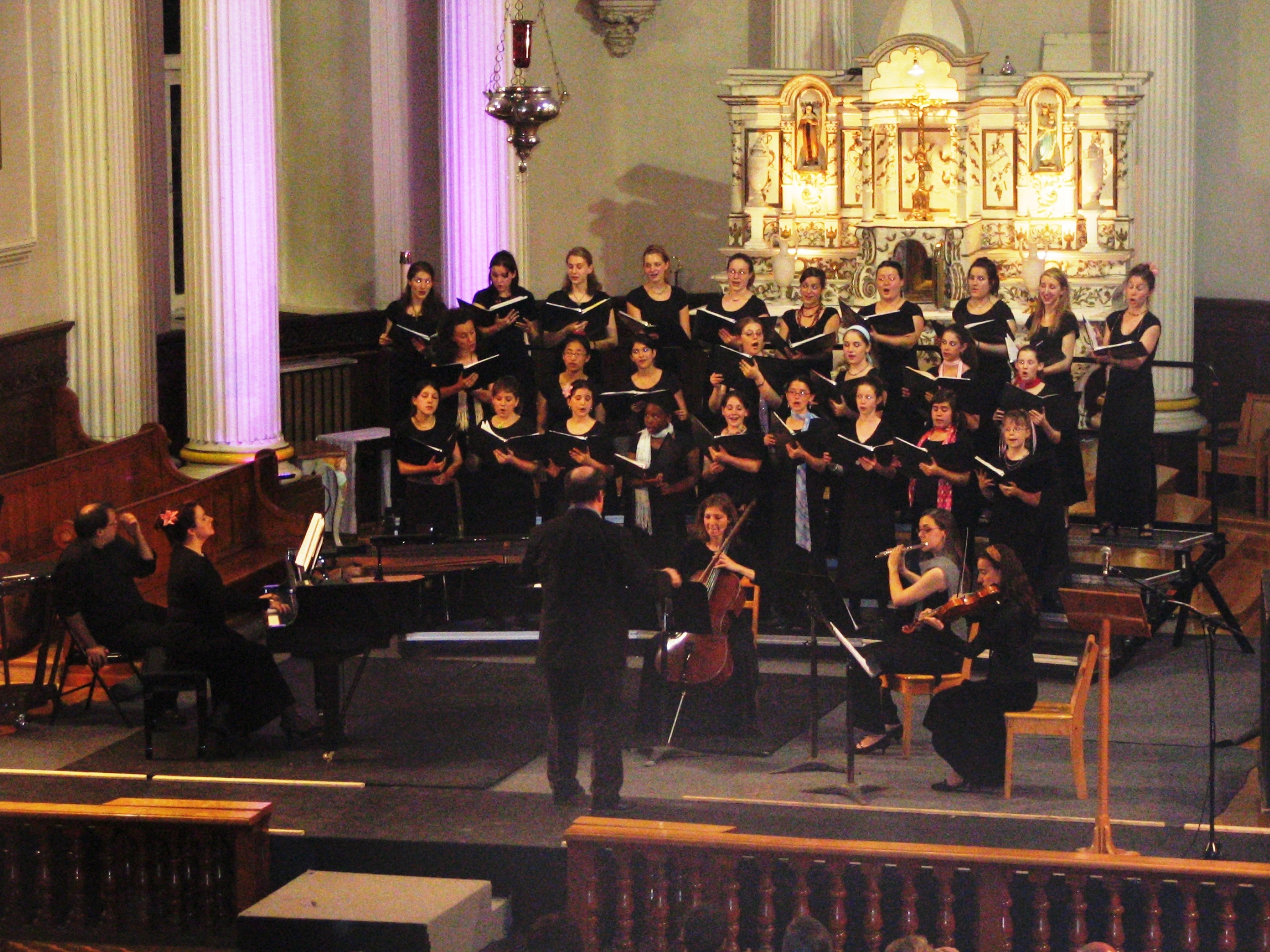 Concert Ouverture 2006